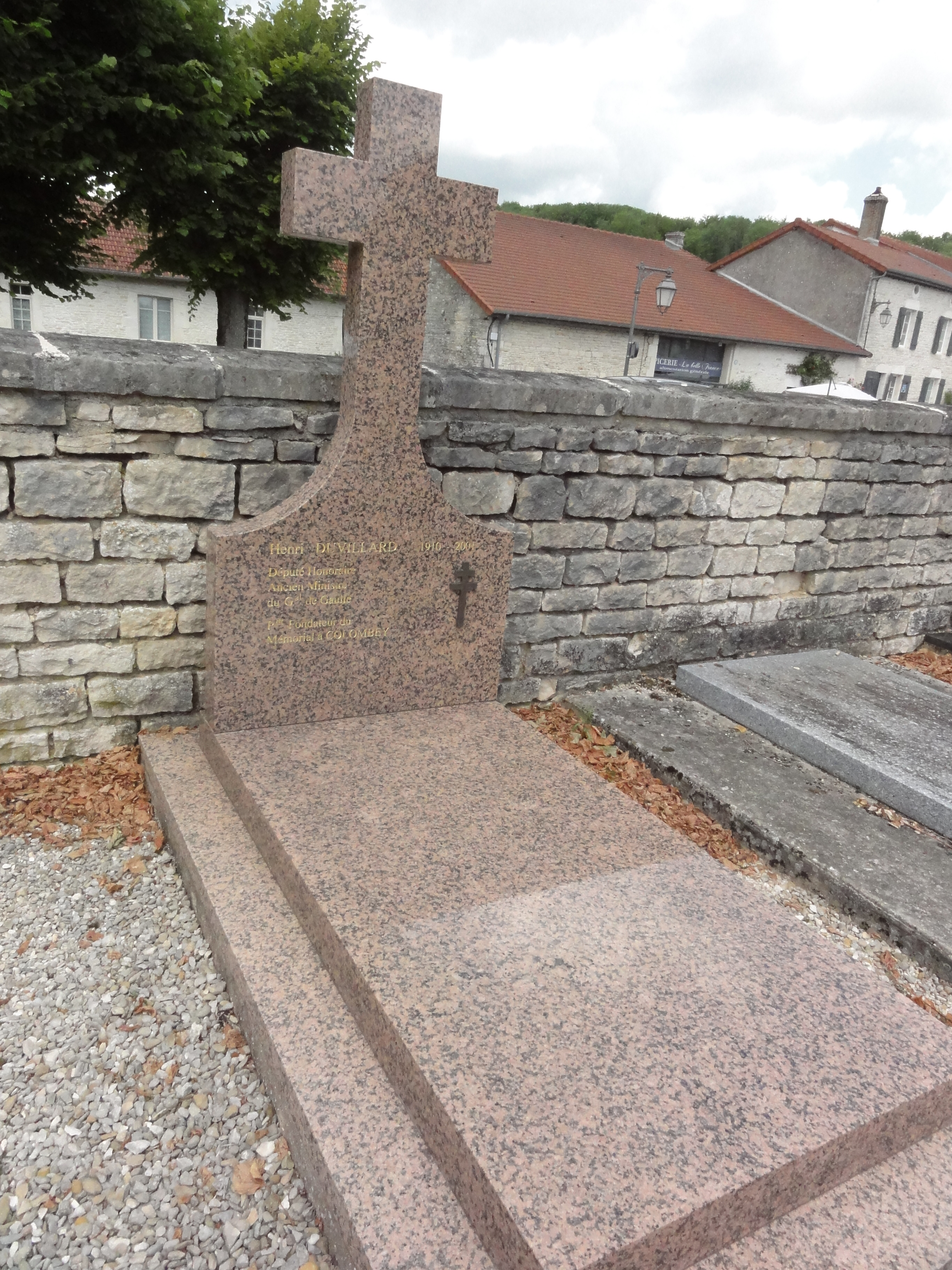 Colombey-les-deux-Églises (Haute-Marne) tombe de Henri Duvillard, ministre